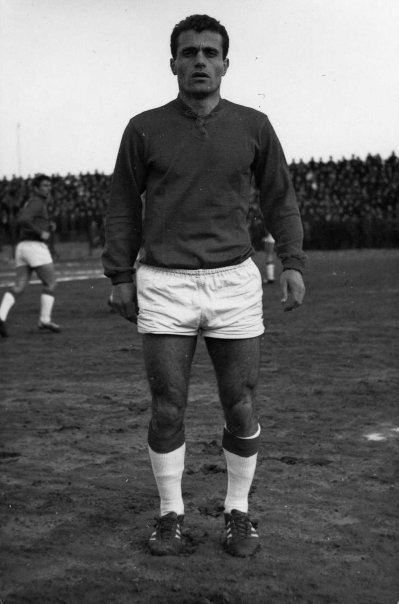 Yılmaz Yurttaş